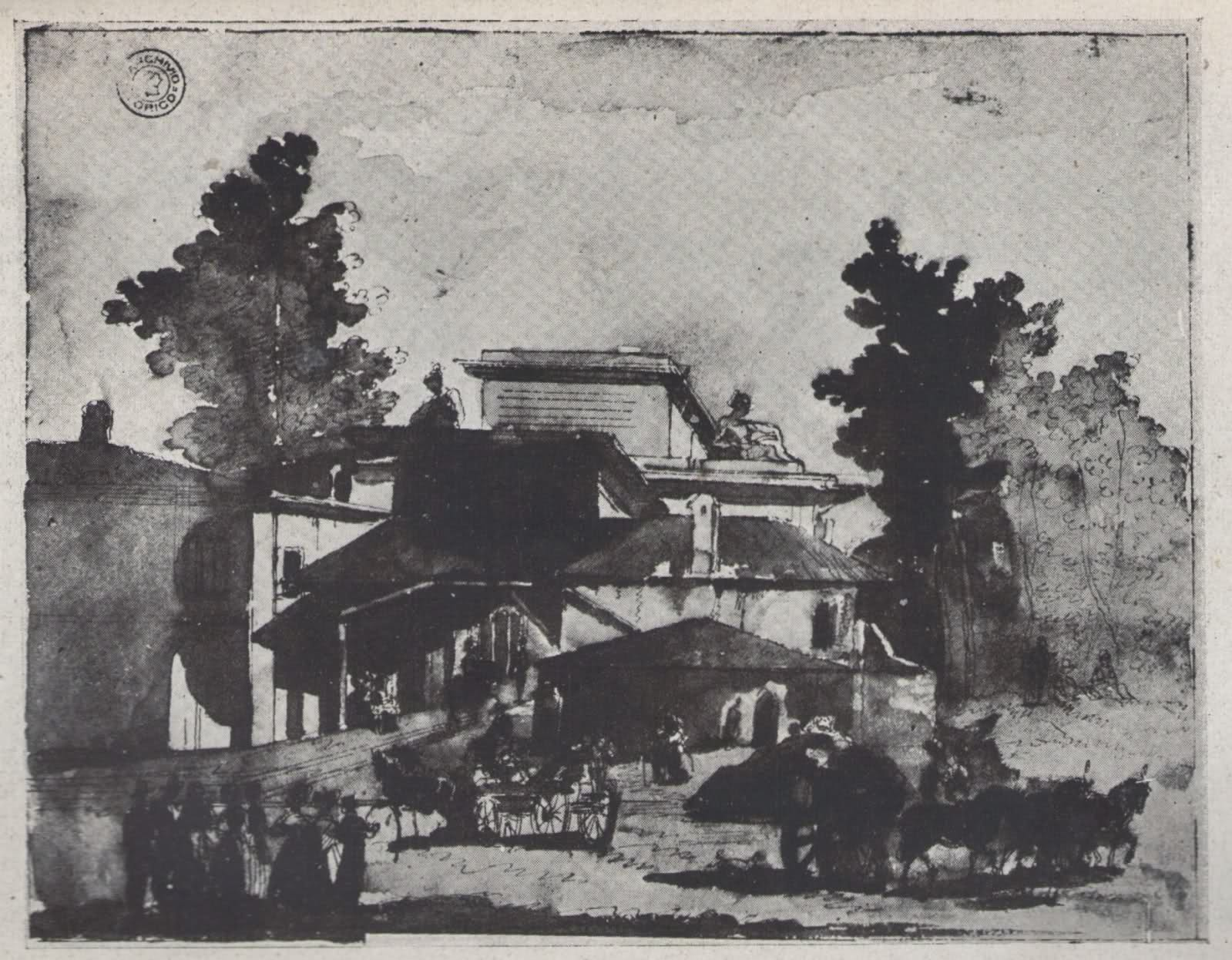 Milano, la Porta Comasina spagnola affiancata per un brevissimo periodo alla successiva porta neoclassica, nel 1826 circa.